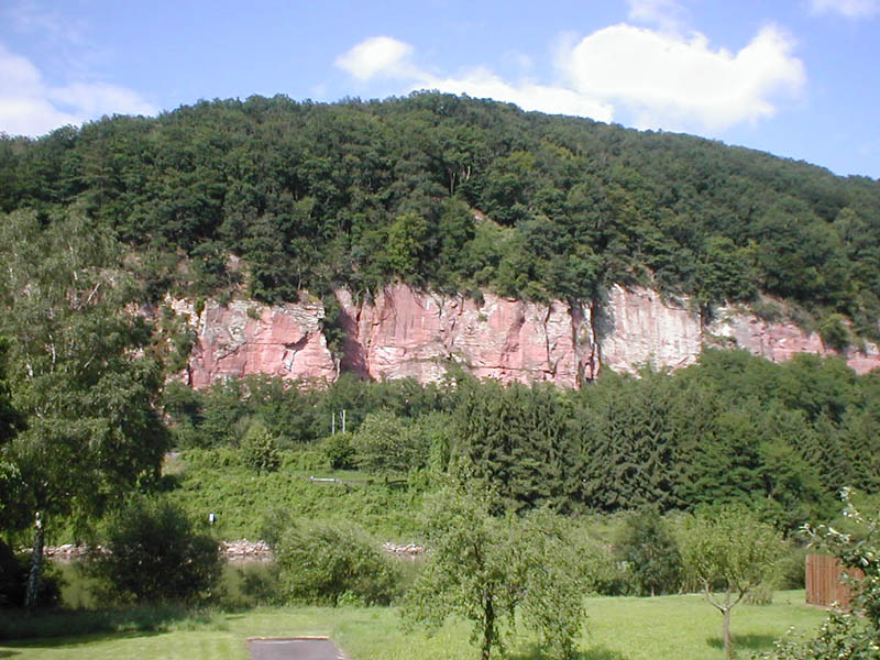 Charakteristische Odenwälder Buntsandsteinformation bei Eberbach am Neckar (Teufelskanzel)